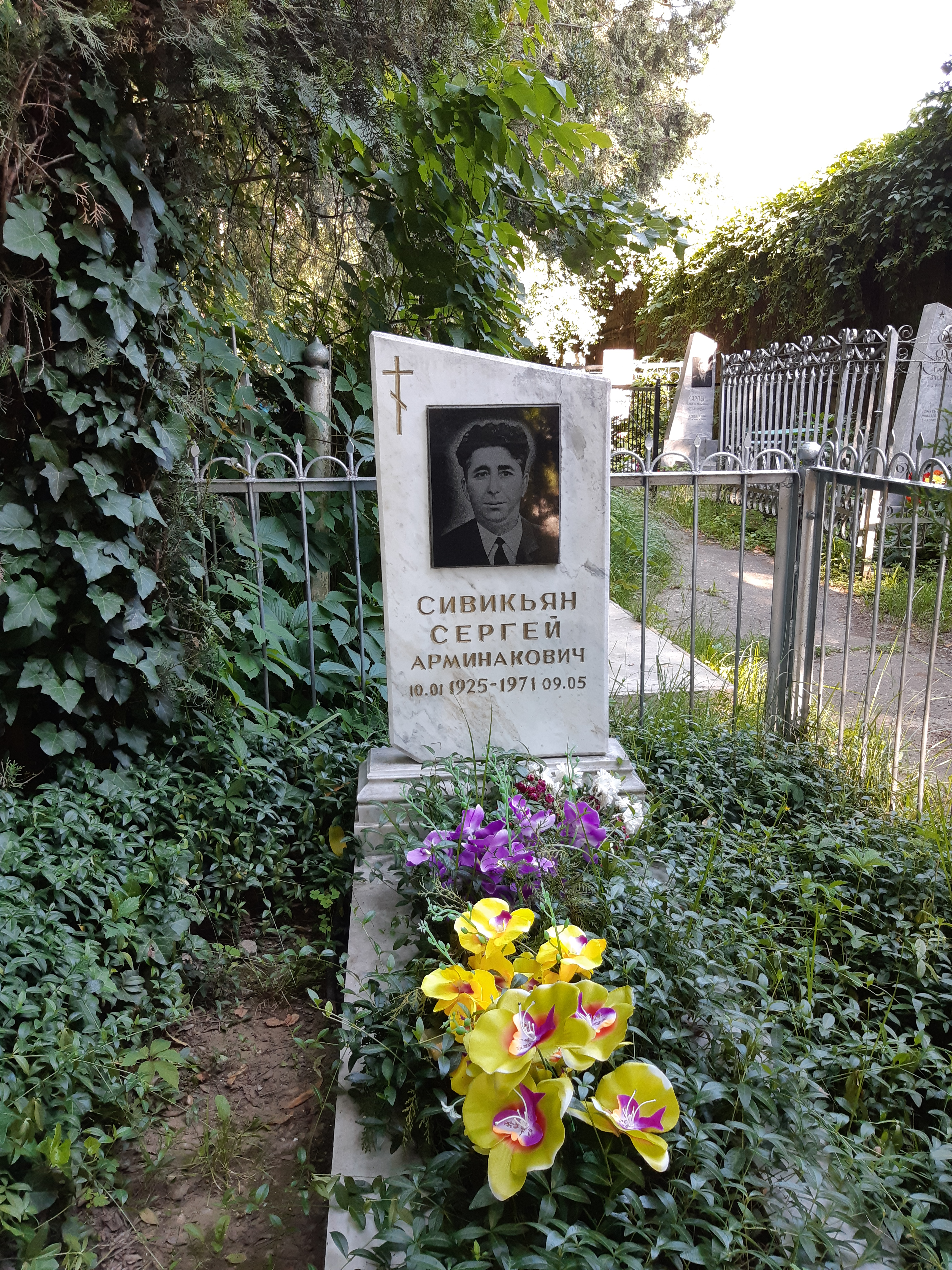 Сивикьян Сергей Арминакович -полный каварер ордена Славы